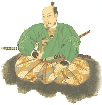 菊池武包の肖像。